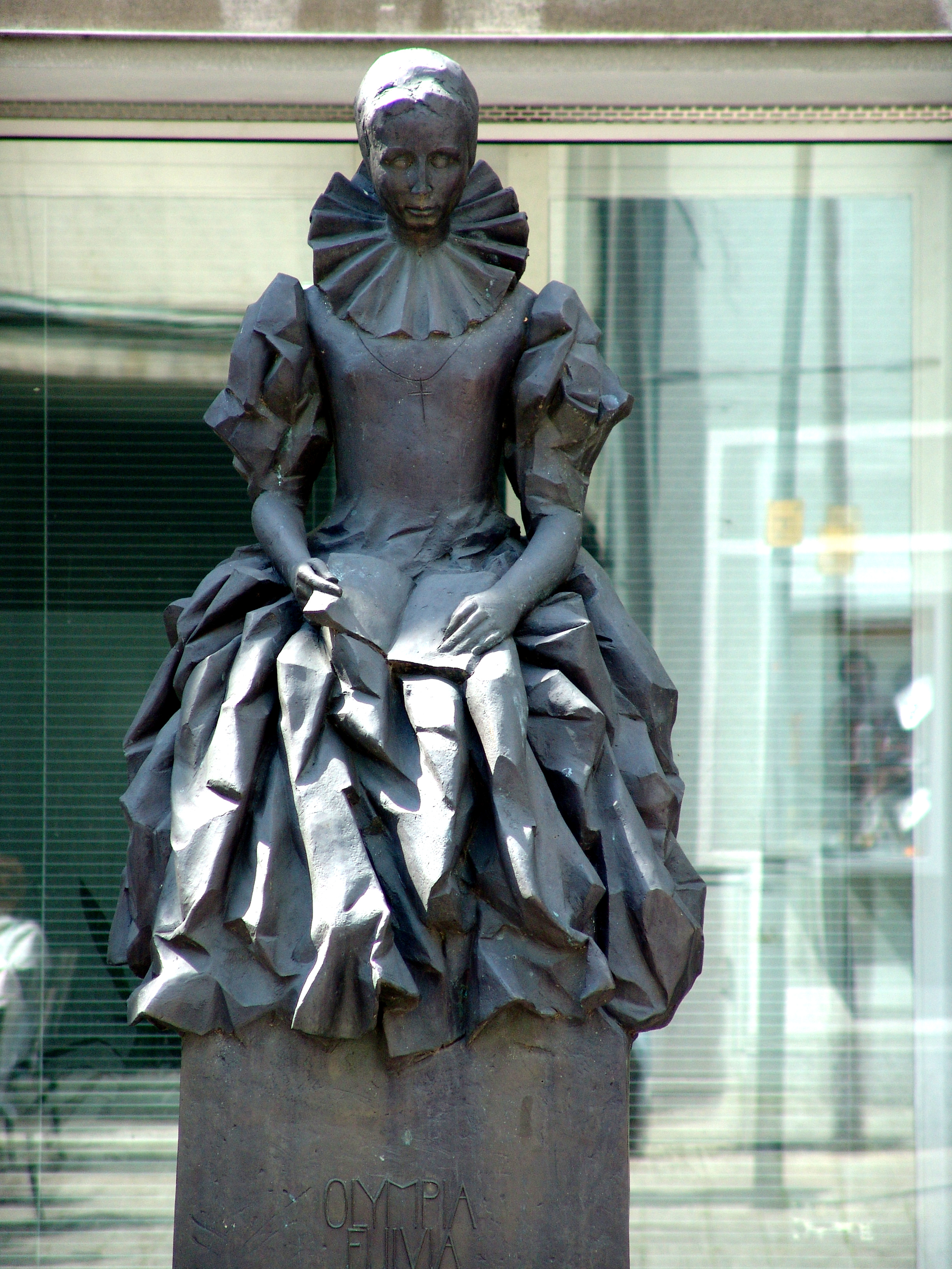 OlympiaFulvia Morata Denkmal